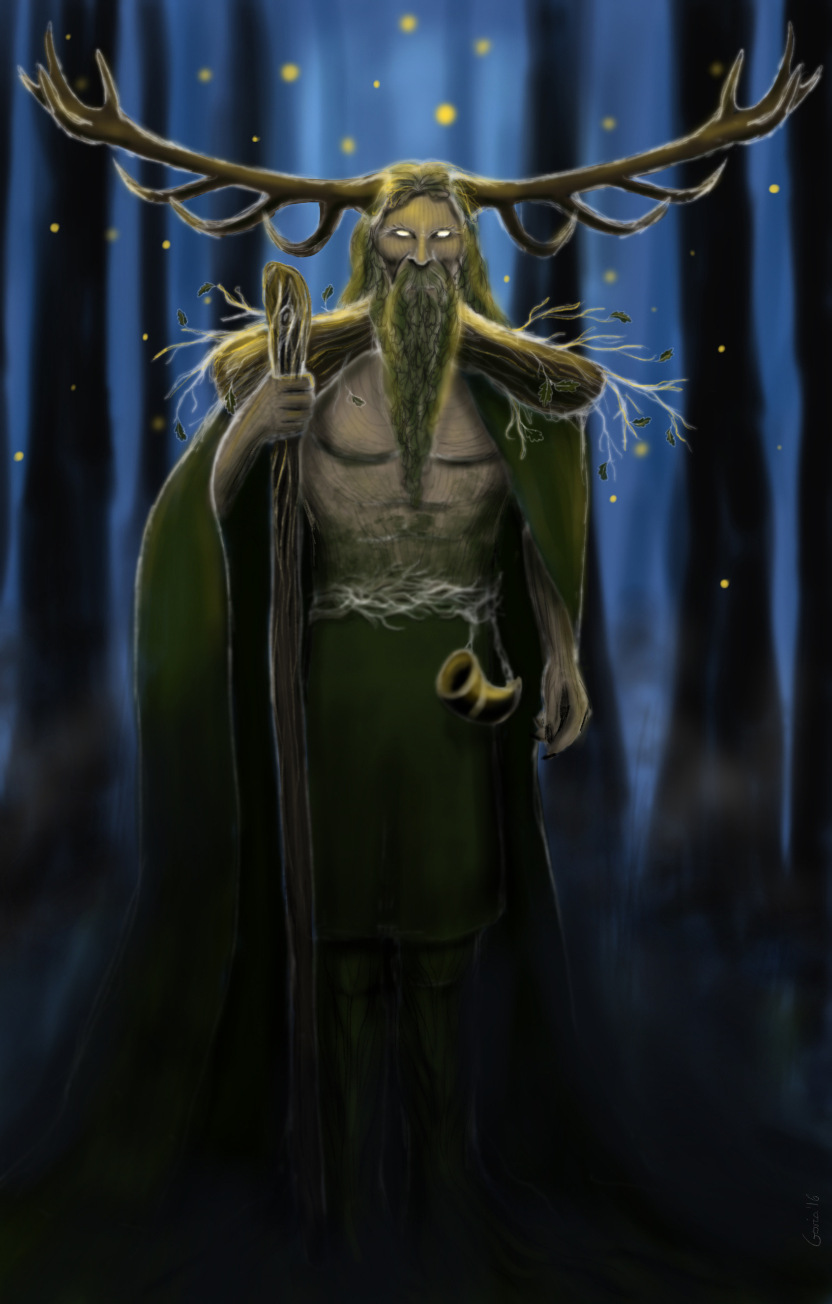 Leszy, opiekun lasu